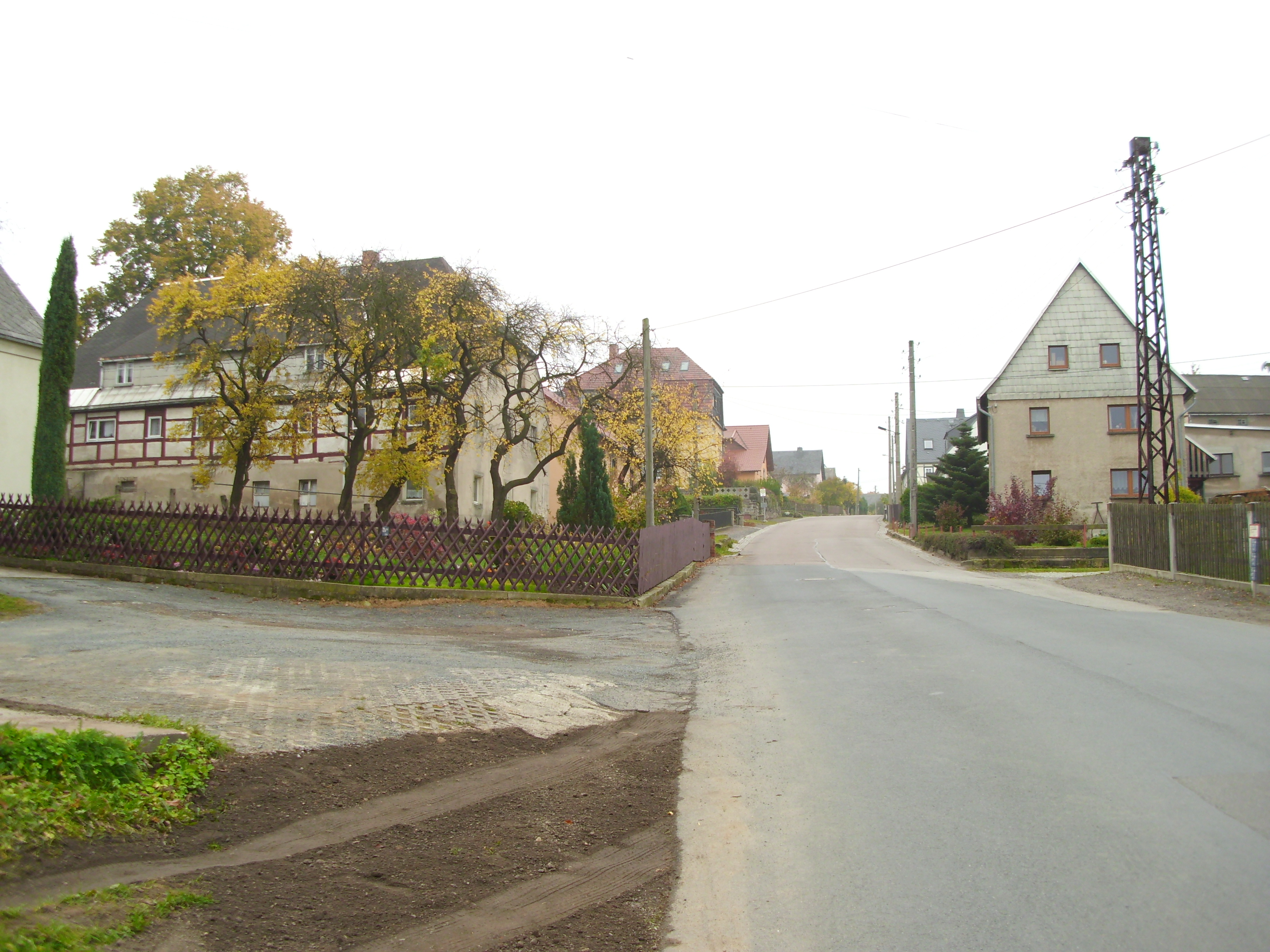 Das Oberdorf von Seifersdorf am Ausgang des Seitentals der Weißeritz ist auch der alte Dorfkern des 1282 erstmals erwähnten Dorfes.